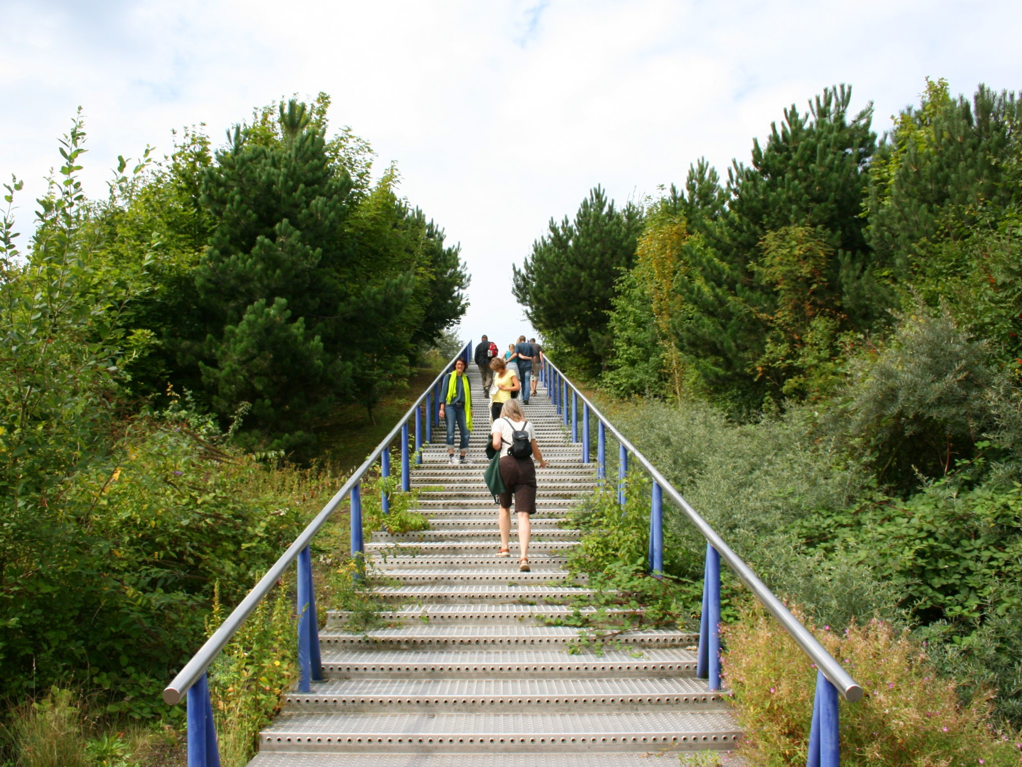 Schurenbachhalde in Essen